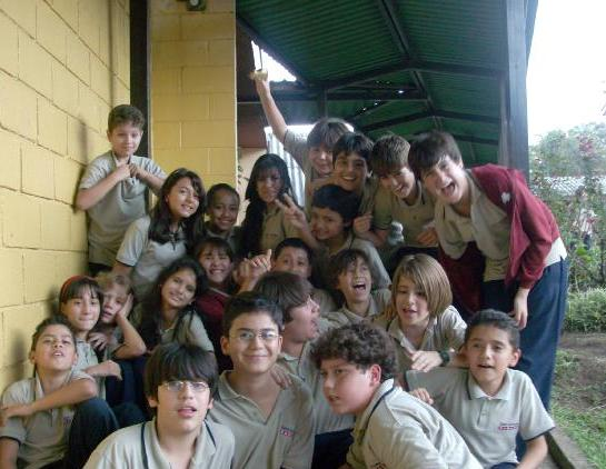 Niños costarricenses en escuela.